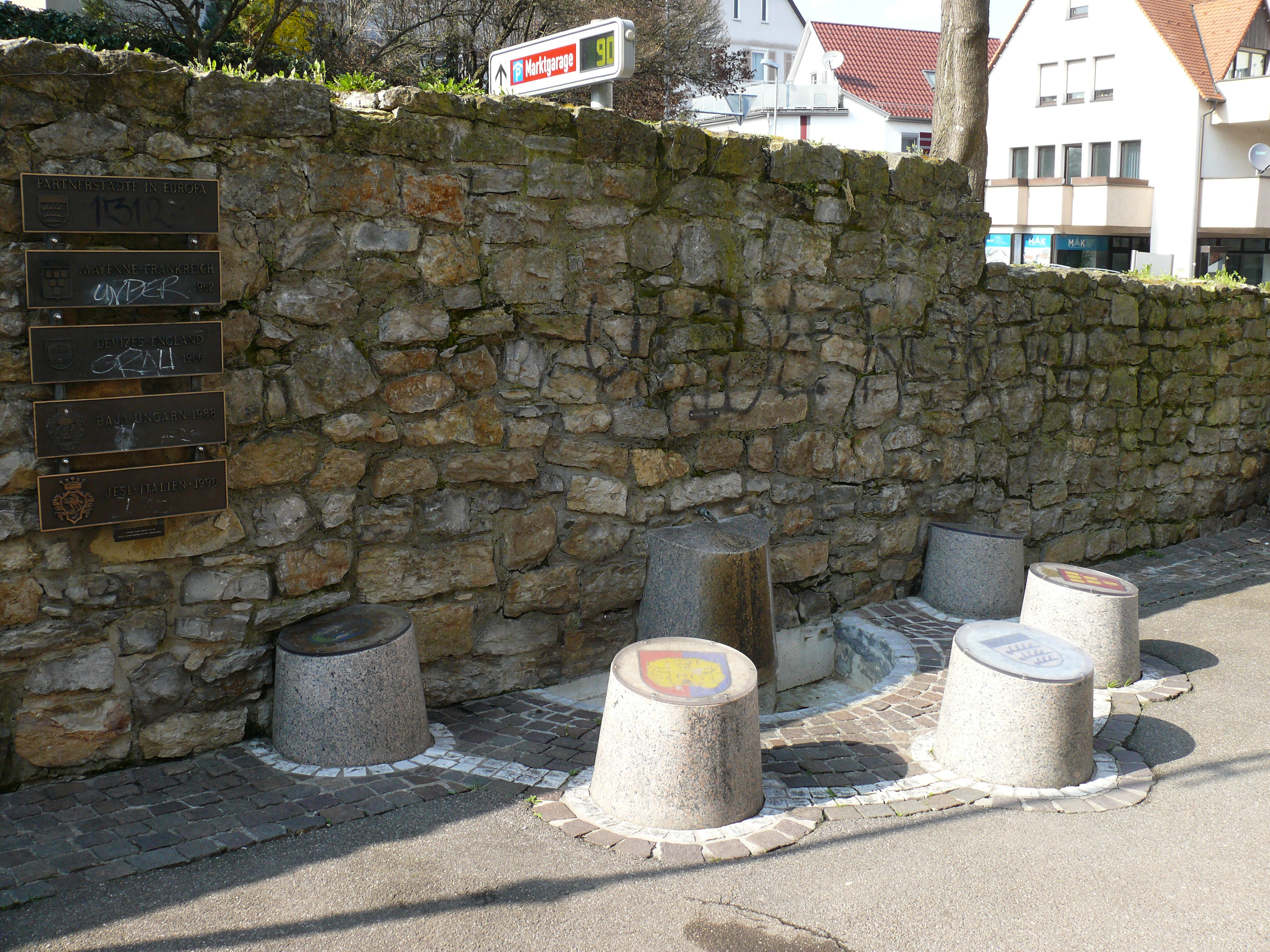 Waiblingens Partnerstädte an der Stadtmauer am Hochwachtturm.